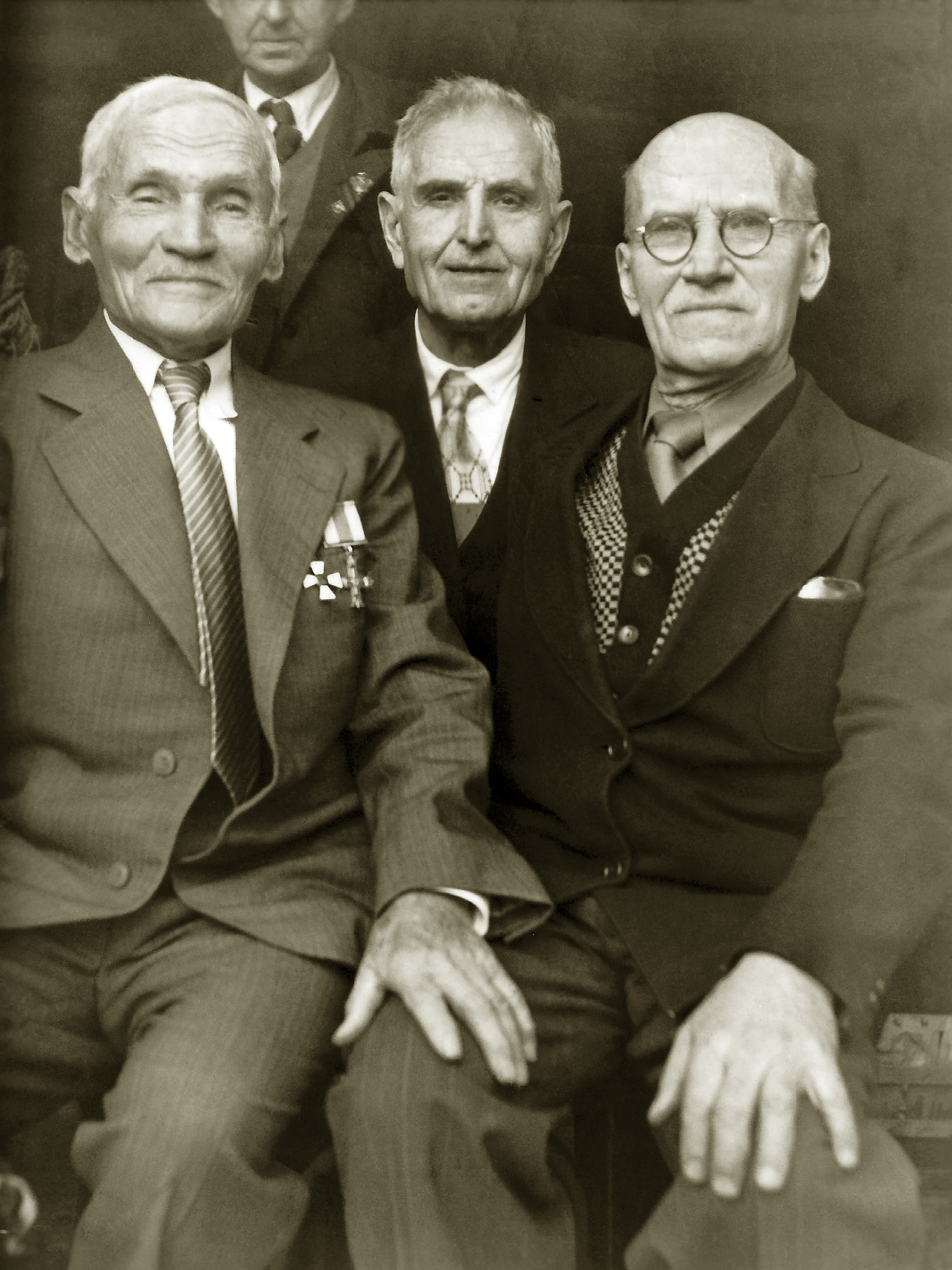 Офицеры императорской армии России в эмиграции (Мужен). Выпускники Чугуевского кадетского корпуса. генерал-майор Присовский, Константин Адамович подполковник П. А. Борковский и генерал Куявский, Александр Альфонсович в Каннах.